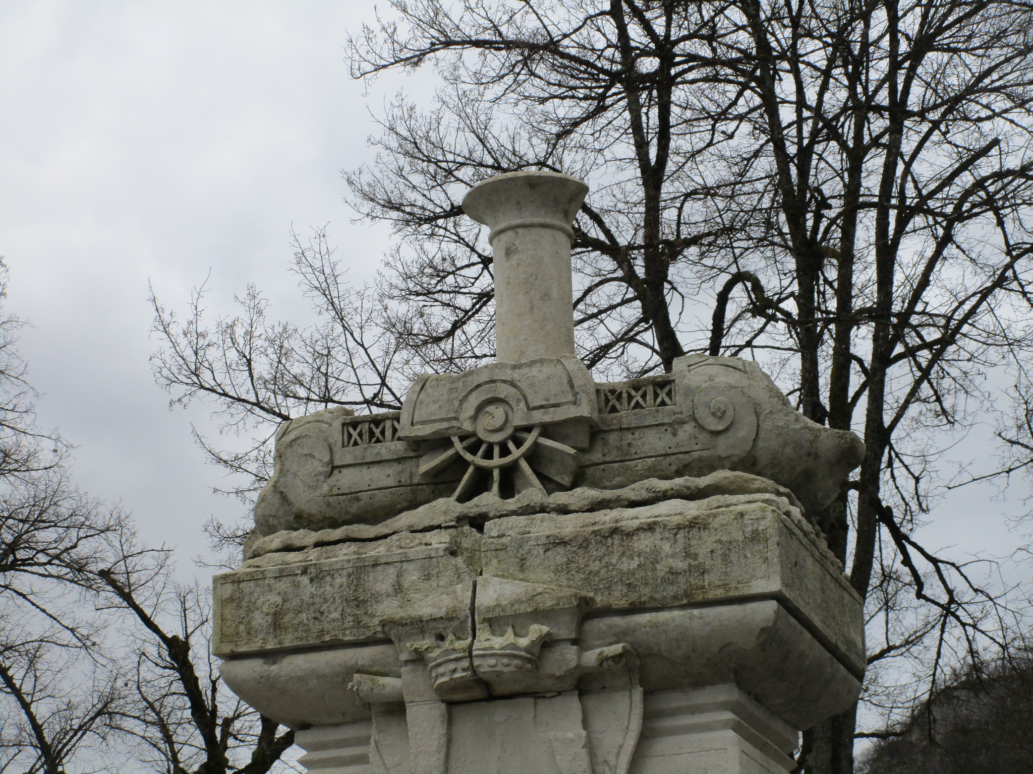 Monument de Baume-les-Dames, à la mémoire de Claude François Jouffroy d'Abbans